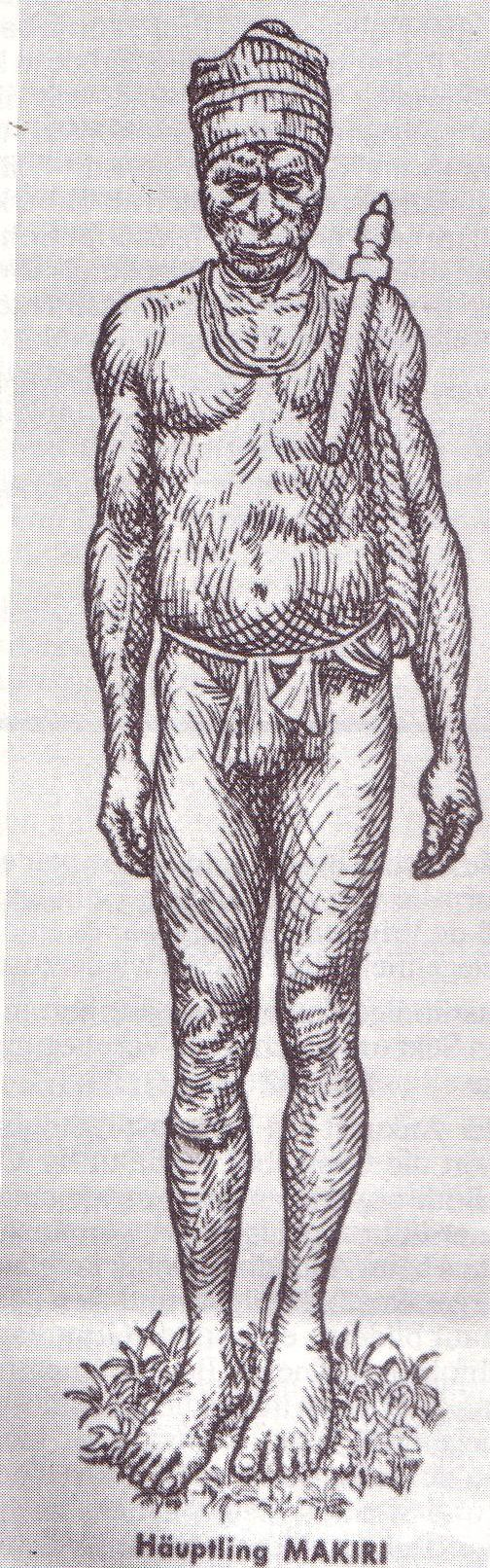 Zeichnung des Papua-Häuptlings Makiri